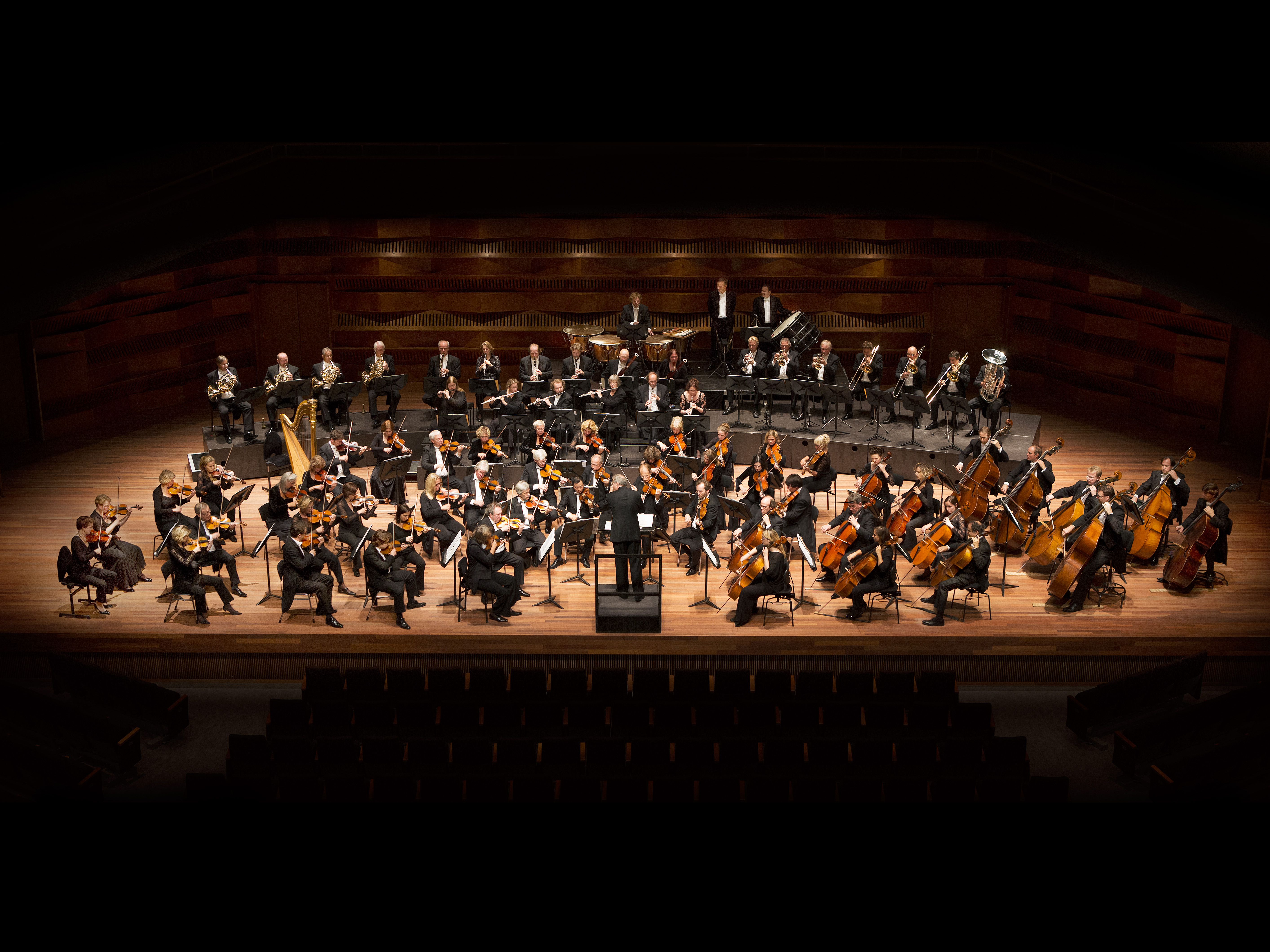 Noord Nederlands Orkest in De Oosterpoort in Groningen